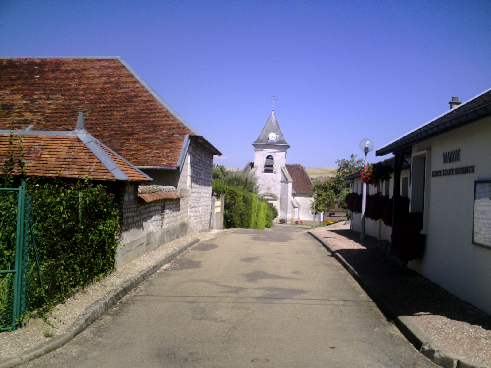 centre de Prugny